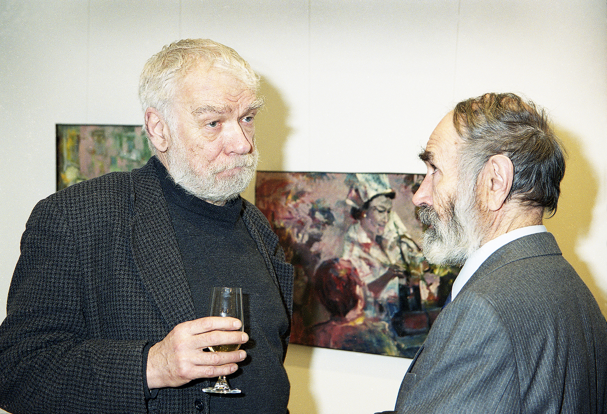 Enn Põldroos ja Nikolai Kormašov, Eesti kunstnikud 2000